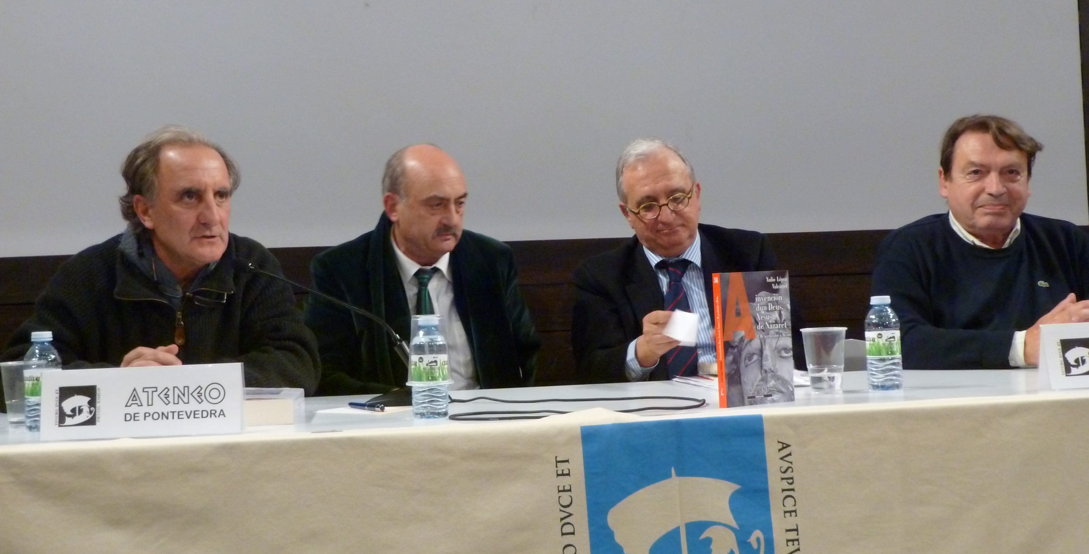 Xulio López Valcárcel